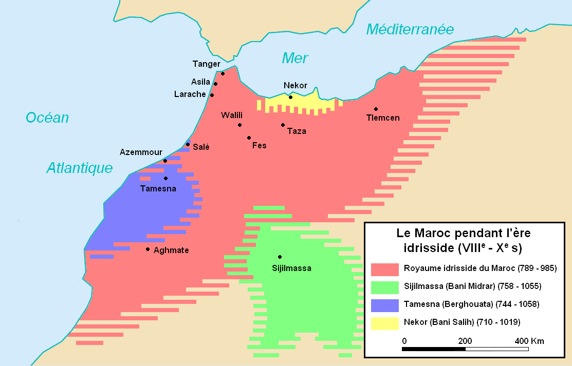 Carte du Maroc pdt. l'ere idrisside. Travail basé essentiellement sur: - les cartes d'Euratlas [1][2] - les travaux de Shepherd [3][4]. - la description du partage du royaume entre les héritiers d'Idriss II en 828 [5][6][7].